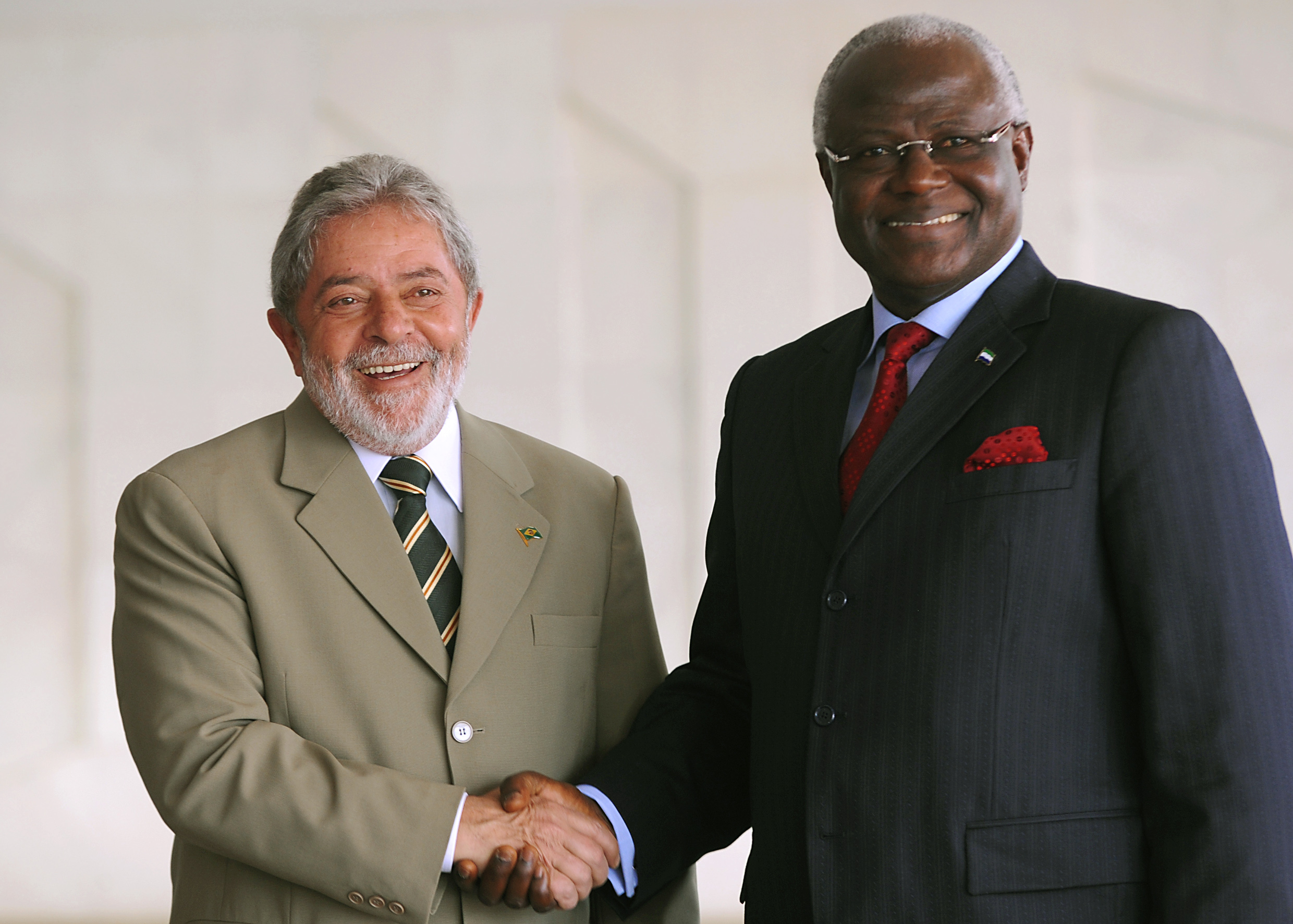 O presidente Luiz Inácio Lula da Silva recebe o presidente de Serra Leoa, Ernest Bai Koroma, no Palácio Itamaraty.